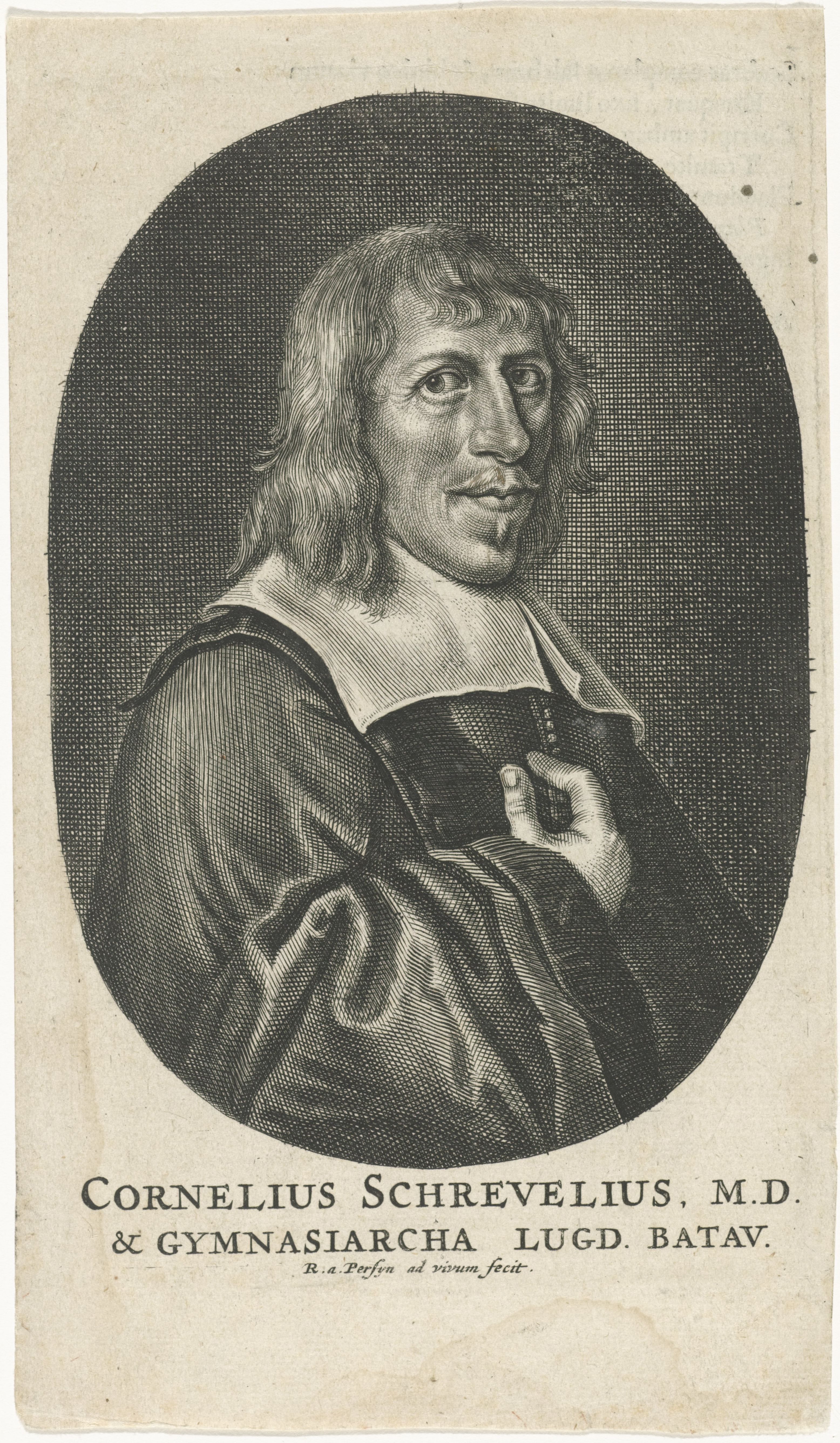 IdentificatieTitel(s): Portret van Cornelius SchreveliusObjecttype: prent boekillustratie Objectnummer: RP-P-OB-60.211Catalogusreferentie: Hollstein Dutch 57-2(2)Van Someren 4976Opschriften / Merken: verzamelaarsmerk, verso, gestempeld: Lugt 2228Omschrijving: Portret van Cornelius Schrevelius, Nederlands filoloog en rector van de Latijnse school in Leiden. In de marge een tweeregelig onderschrift in het Latijn.VervaardigingVervaardiger: prentmaker: Reinier van Persijn (vermeld op object)Plaats vervaardiging: Noord-NederlandDatering: 1623 - 1668Fysieke kenmerken: gravure; boekdruk versoMateriaal: papier Techniek: graveren (drukprocedé) / boekdrukAfmetingen: blad: h 192 mm × b 111 mmOnderwerpWie: Cornelius SchreveliusVerwerving en rechtenVerwerving: onbekendCopyright: Publiek domein